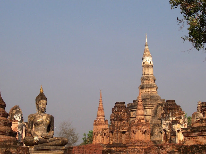 Sukhothai Tapinaklari.